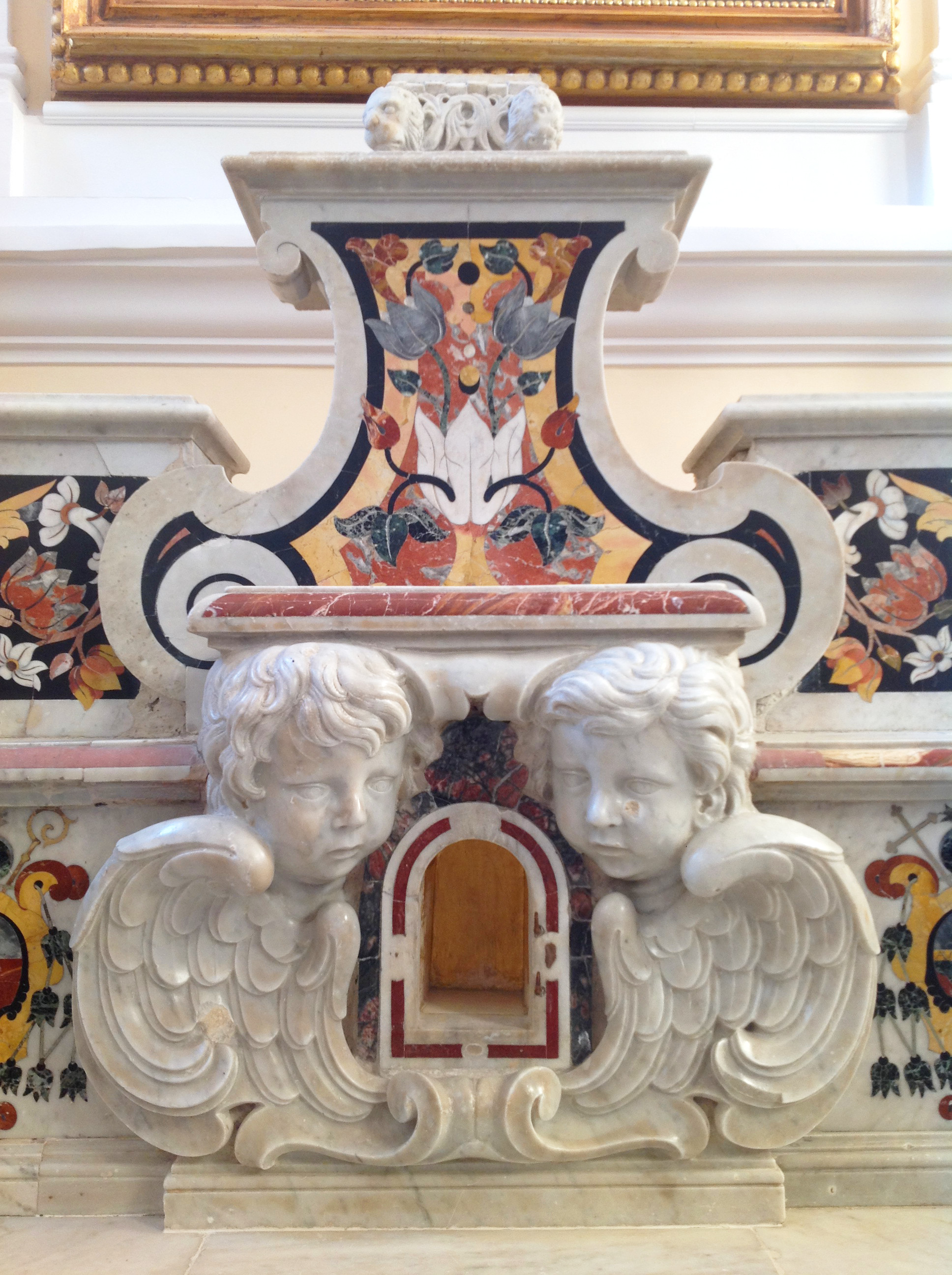 Il tabernacolo dell'altare maggiore barocco.